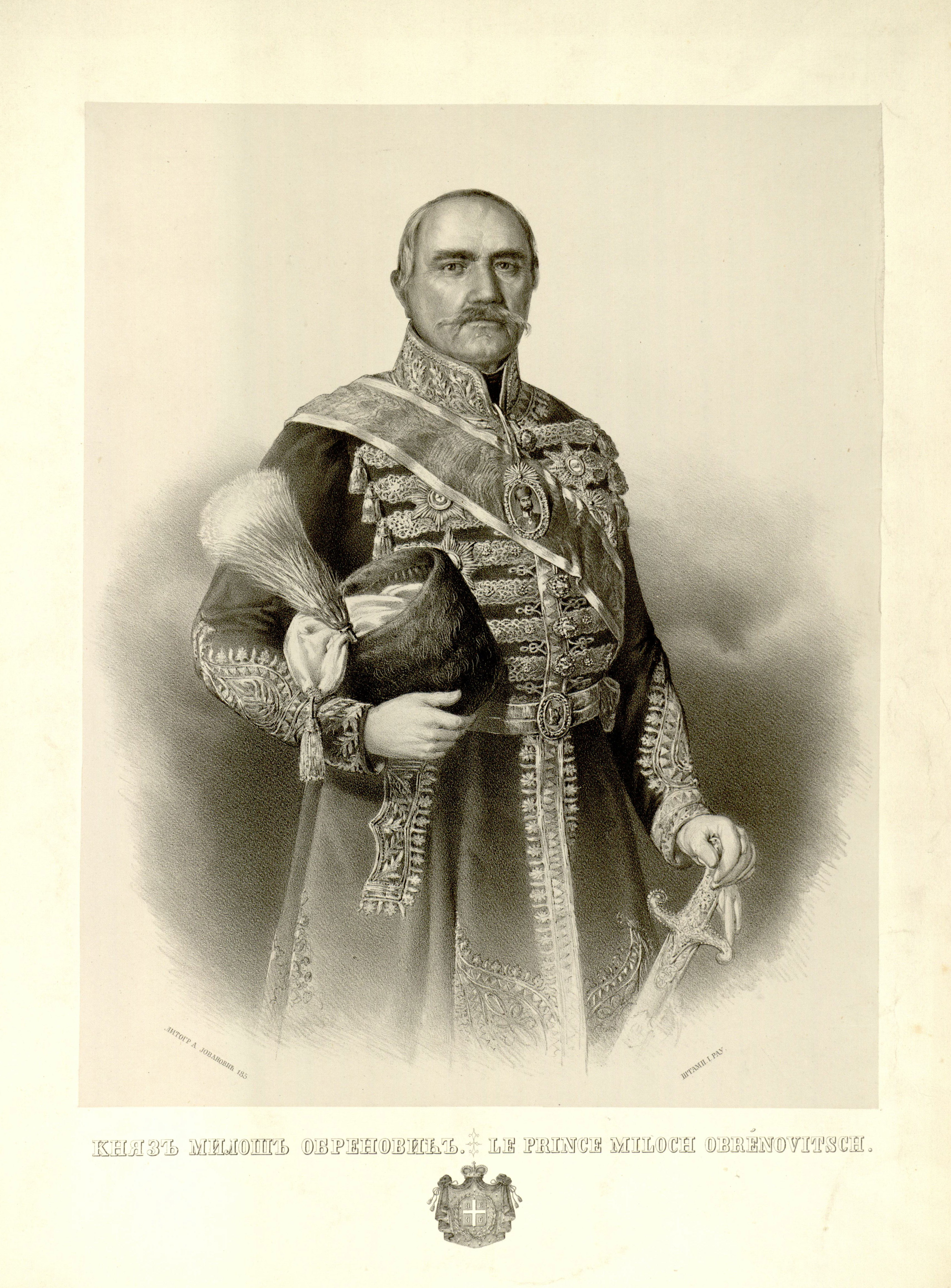 Lithograph of prince Miloš Obrenović by Anastas Jovanović. Caption: литогр. А. Іовановић 185штамп. І. Рау. КНЯЗЪ МИЛОШЪ ОБРЕНОВИЋЪ. ‡ LE PRINCE MILOCH OBRÉNOVITSCH.